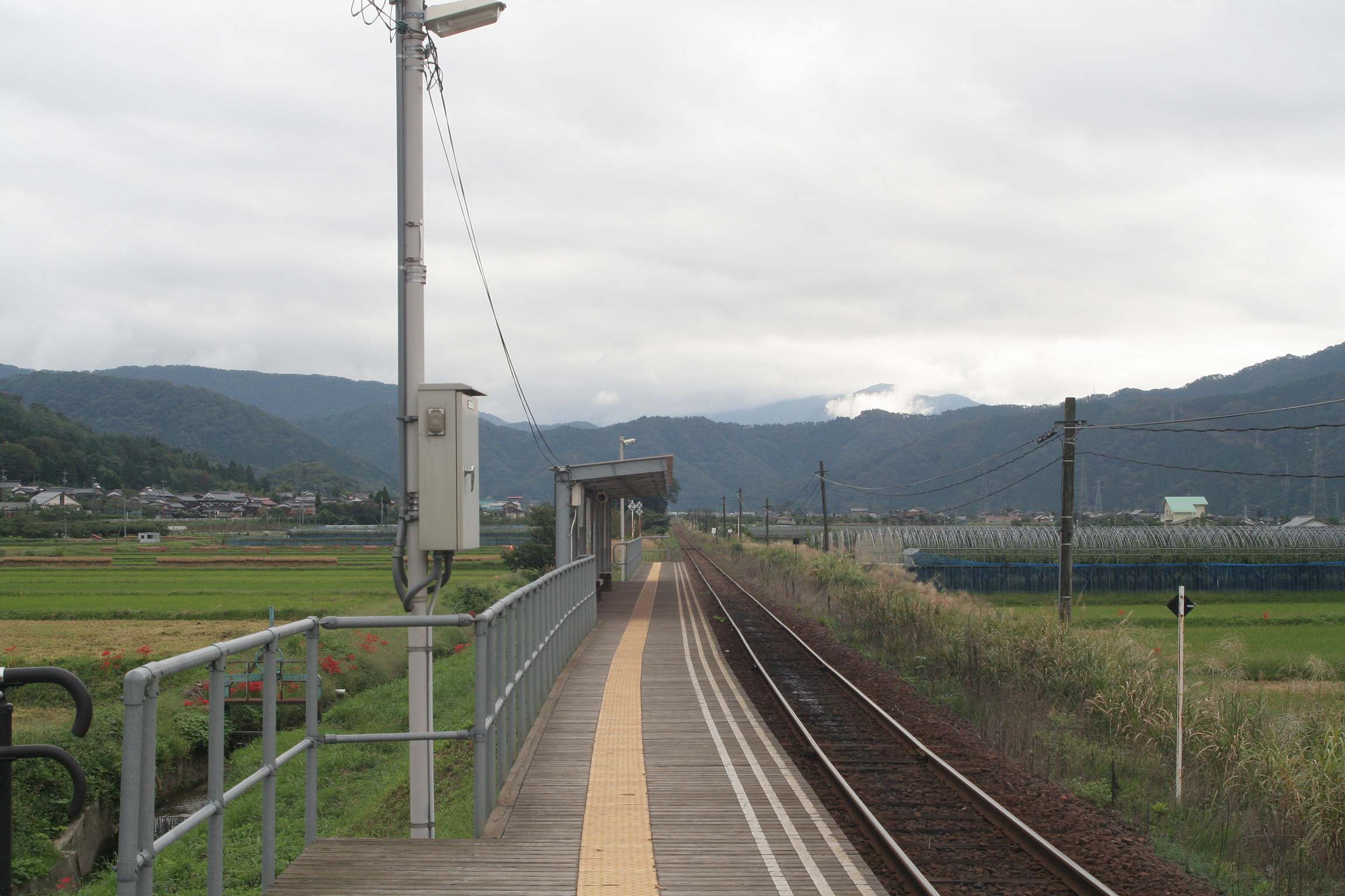 若桜鉄道 徳丸駅の構内